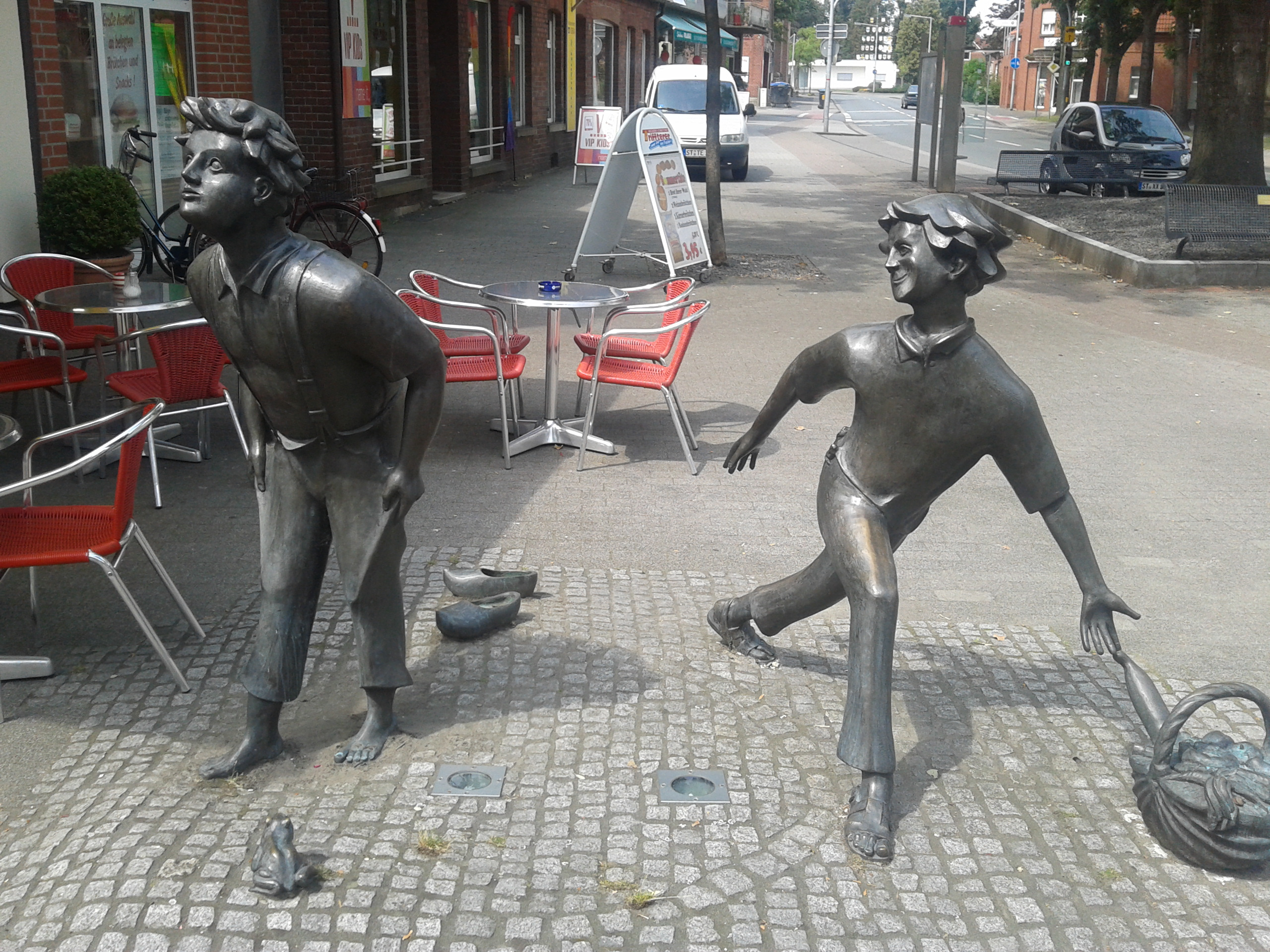 Statue von Schmachtlappen und Feldpogge in Mesum